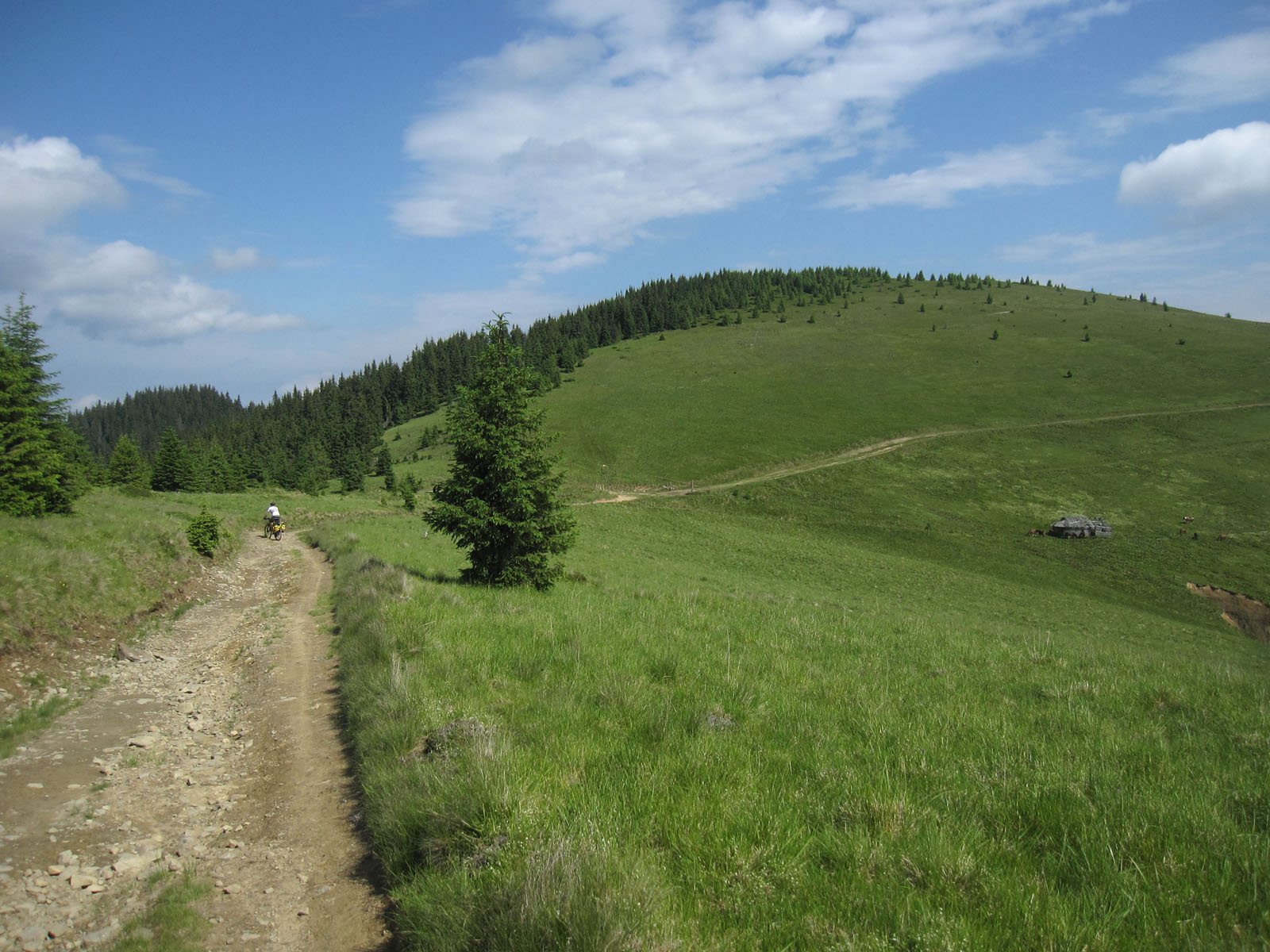 Вершина Стіг